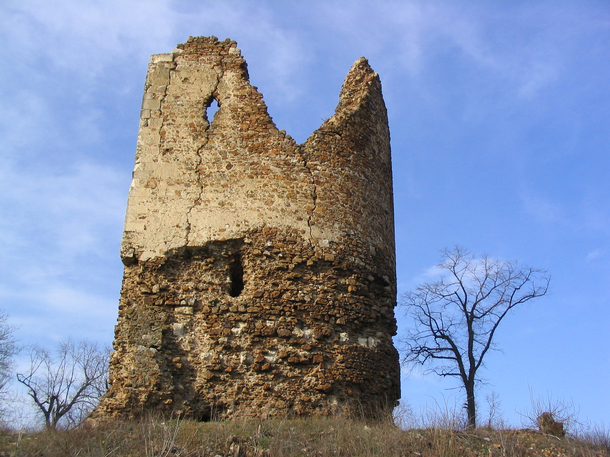 Врдничка кула висине 18.5 метара налази се северно од Врдника на пола сата хода на висини 383 метра. Подигнута је највероватније у 12. веку, мада новија истраживања откривају темеље из римског периода. Припада грађевинама средњовековне војничке архитектуре.